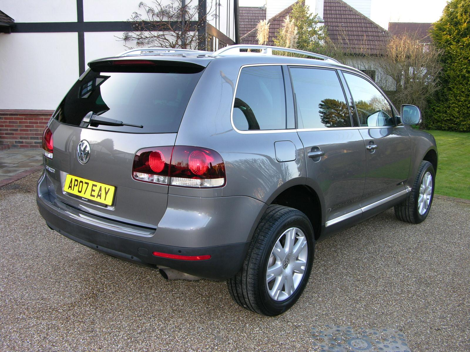 VW Touareg 2.5 Tdi SE